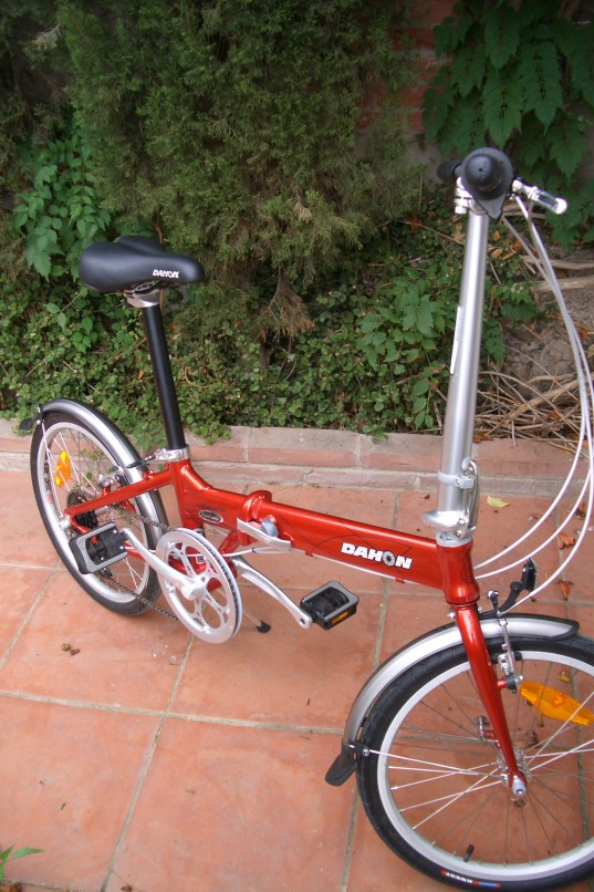 Dahon folding bikeCIMG1160